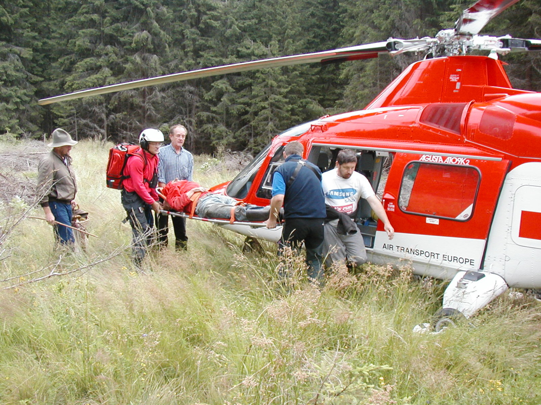 Záchranná akcia v lesnom poraste